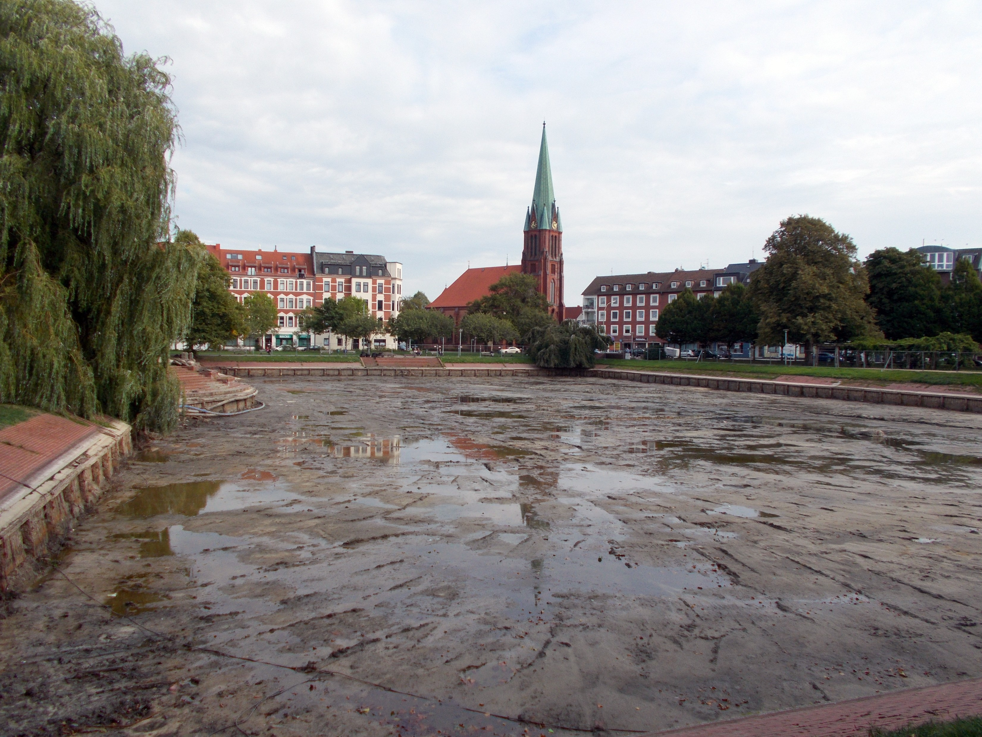 Der Holzhafen im Bremerhavener Stadtteil Geestemünde. Zu Sanierungsarbeiten wurde das Wasser aus dem Becken abgelassen.